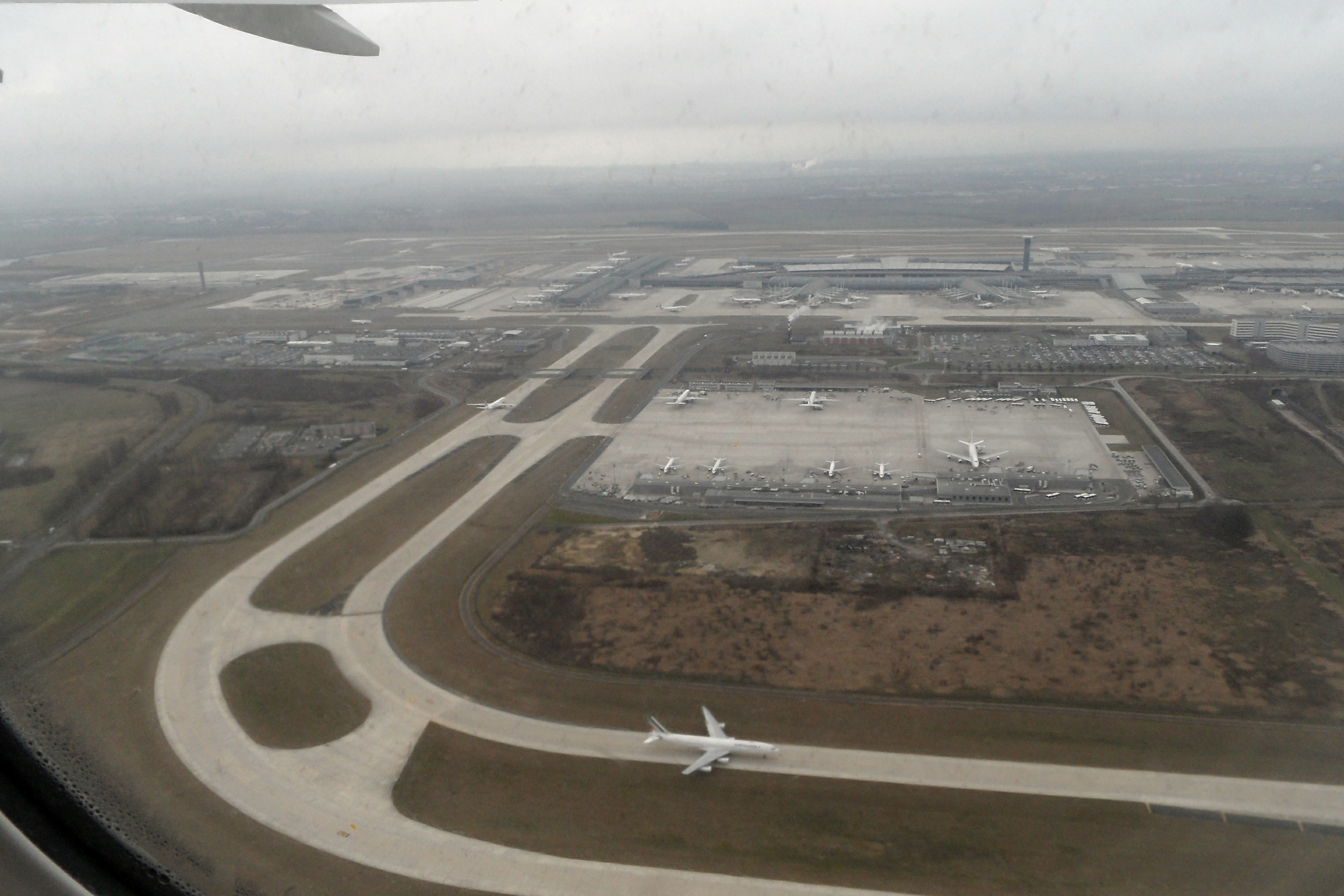 MSN 27609 B777-228 ER AIR FRANCE FLIGHT CDG-ATL